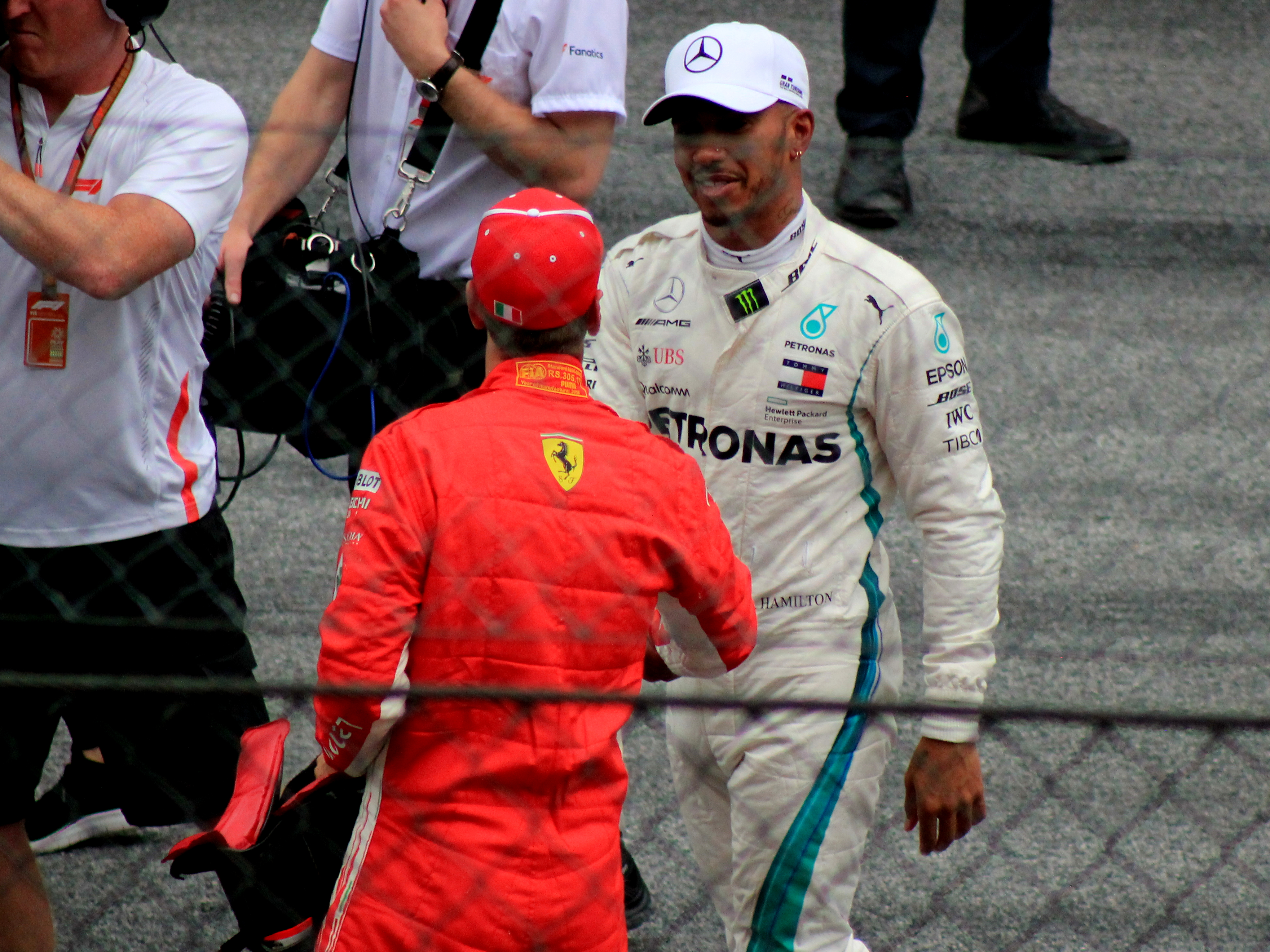 Hamilton und Vettel schütteln einander die Hände nach dem Qualifying